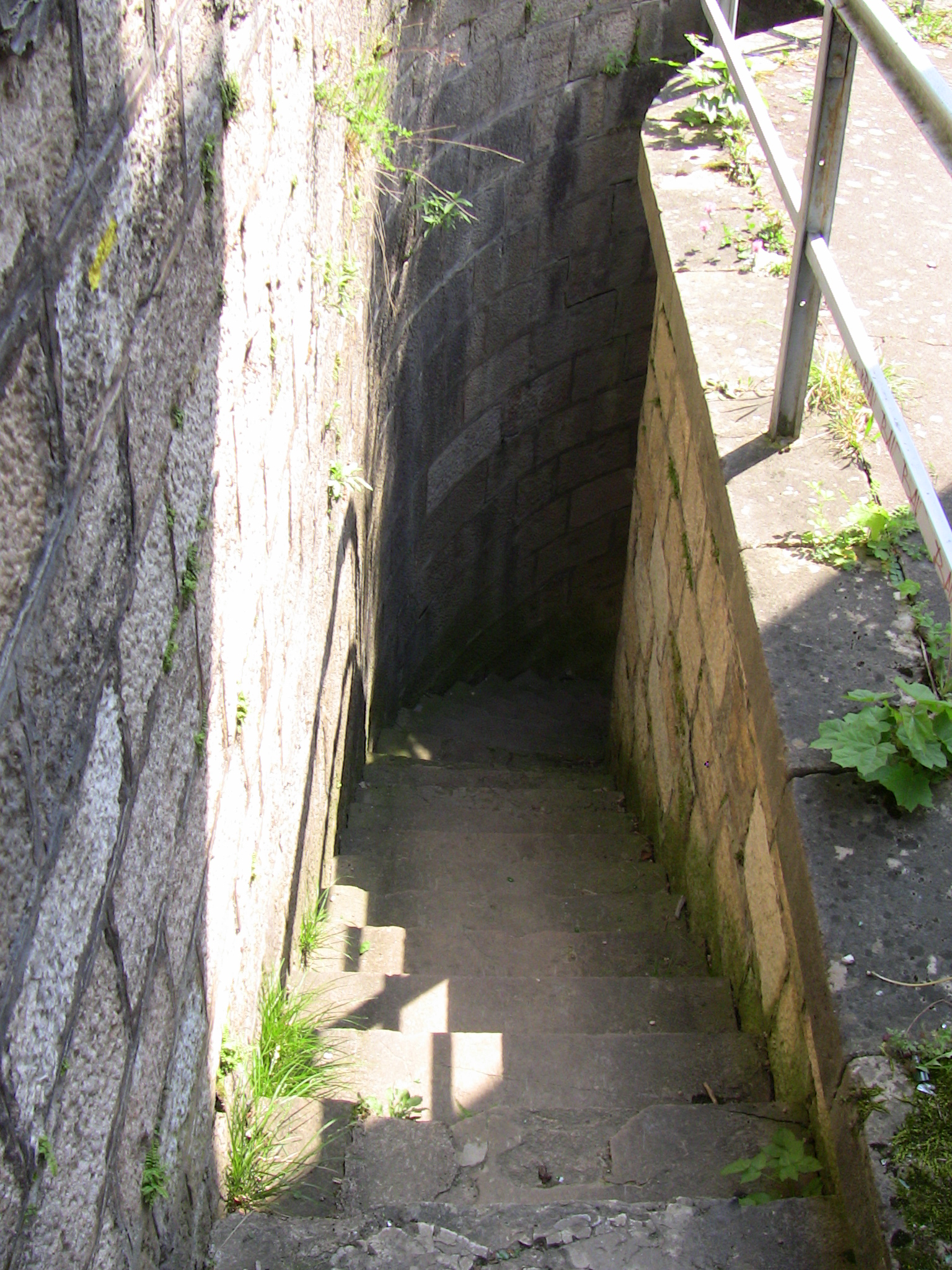 La poterne du fort de Beauregard, à Besançon (Doubs, France).